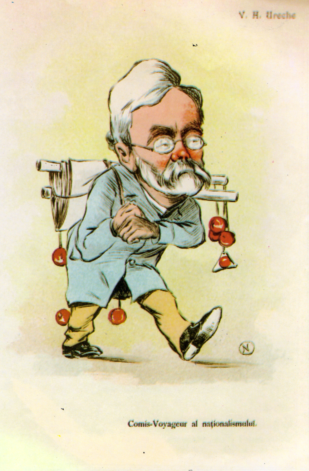 V.A. Urechia (caricatură din Albumul Contemporani). Comis-Voyageur al naționalismului